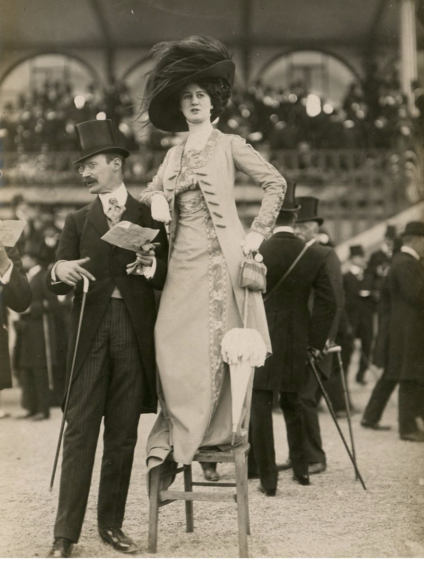 Photographie de mode au champ de course, Séeberger frères